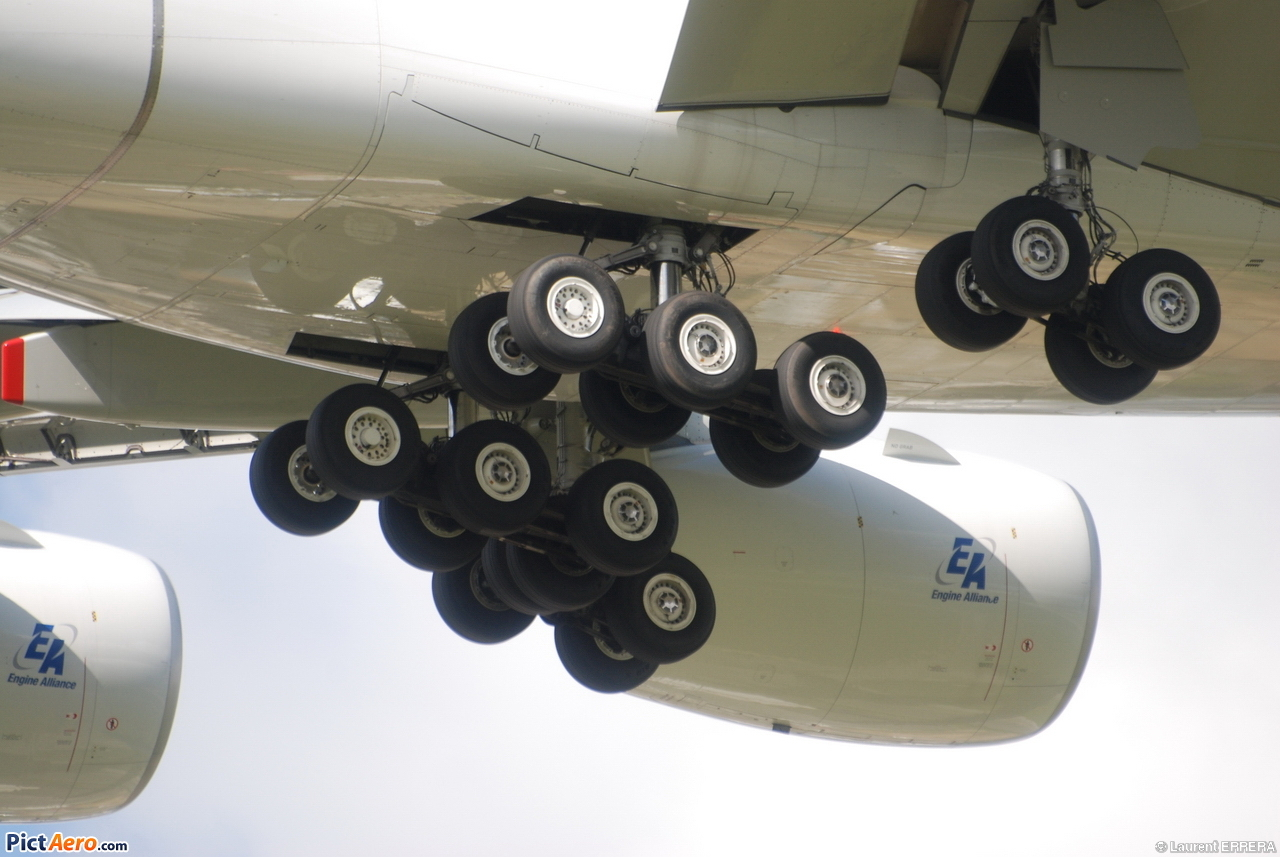 Photo prise à l'aéroport de Toulouse-Blagnac (LFBO) en France. Picture take at Toulouse-Blagnac Airport (LFBO) in France.